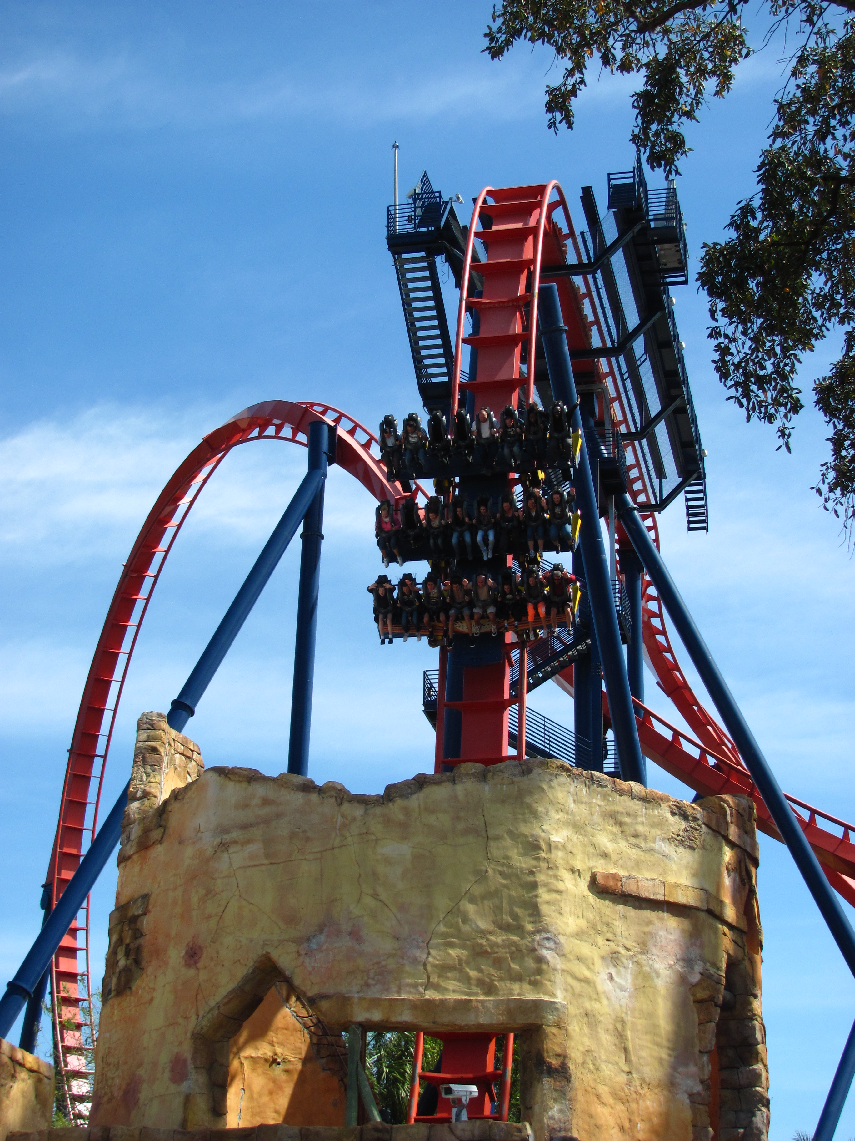 SheiKra